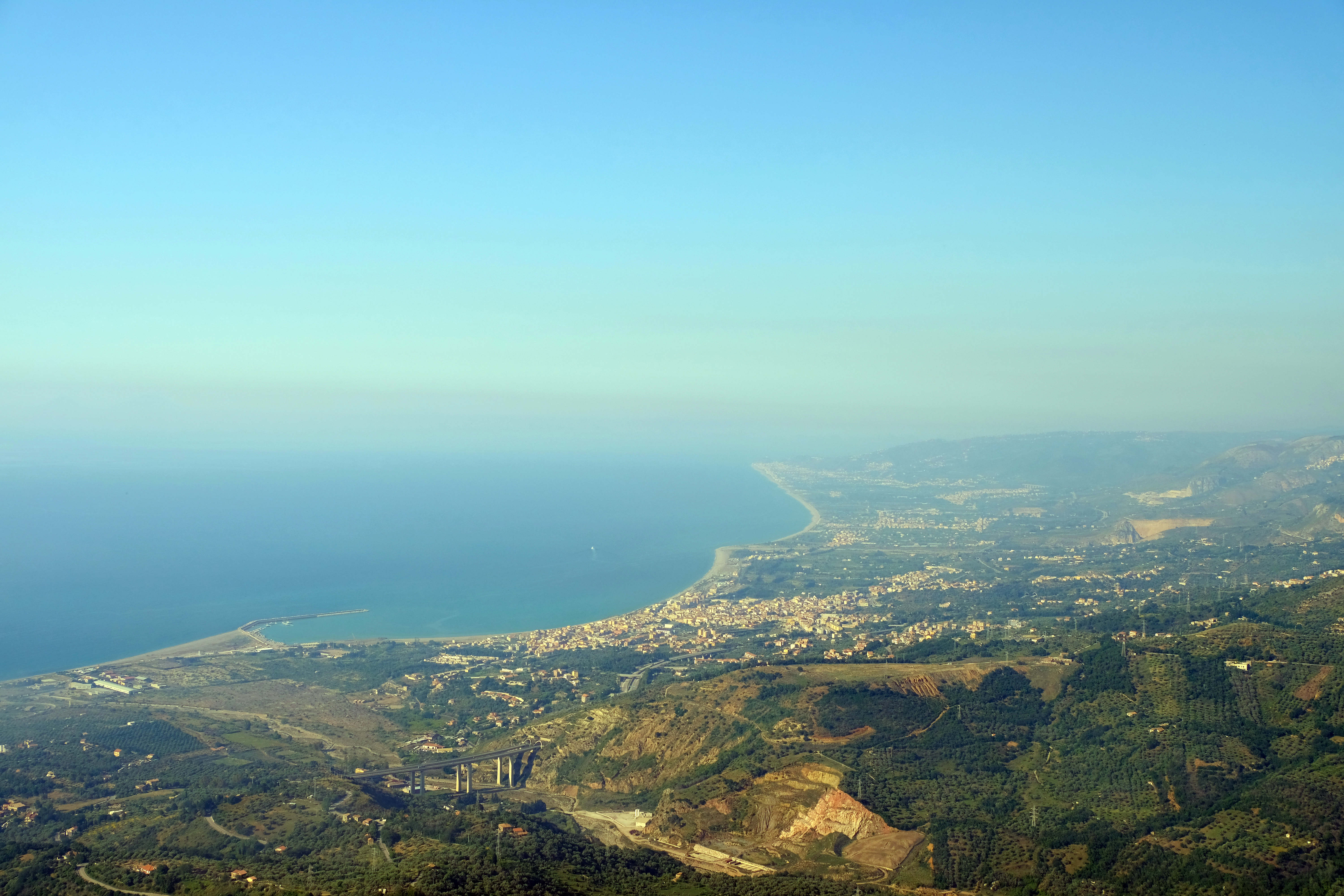 Sant'Agata di Militello da San Fratello